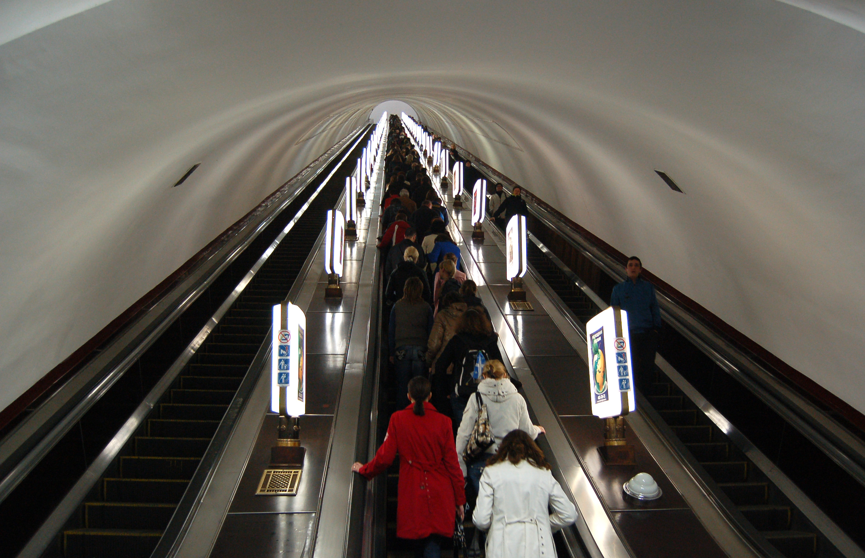 Станция метро «Арсенальная», нижний эскалаторный наклон